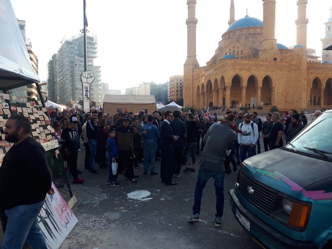 Proteste in Beirut, Dezember 2019